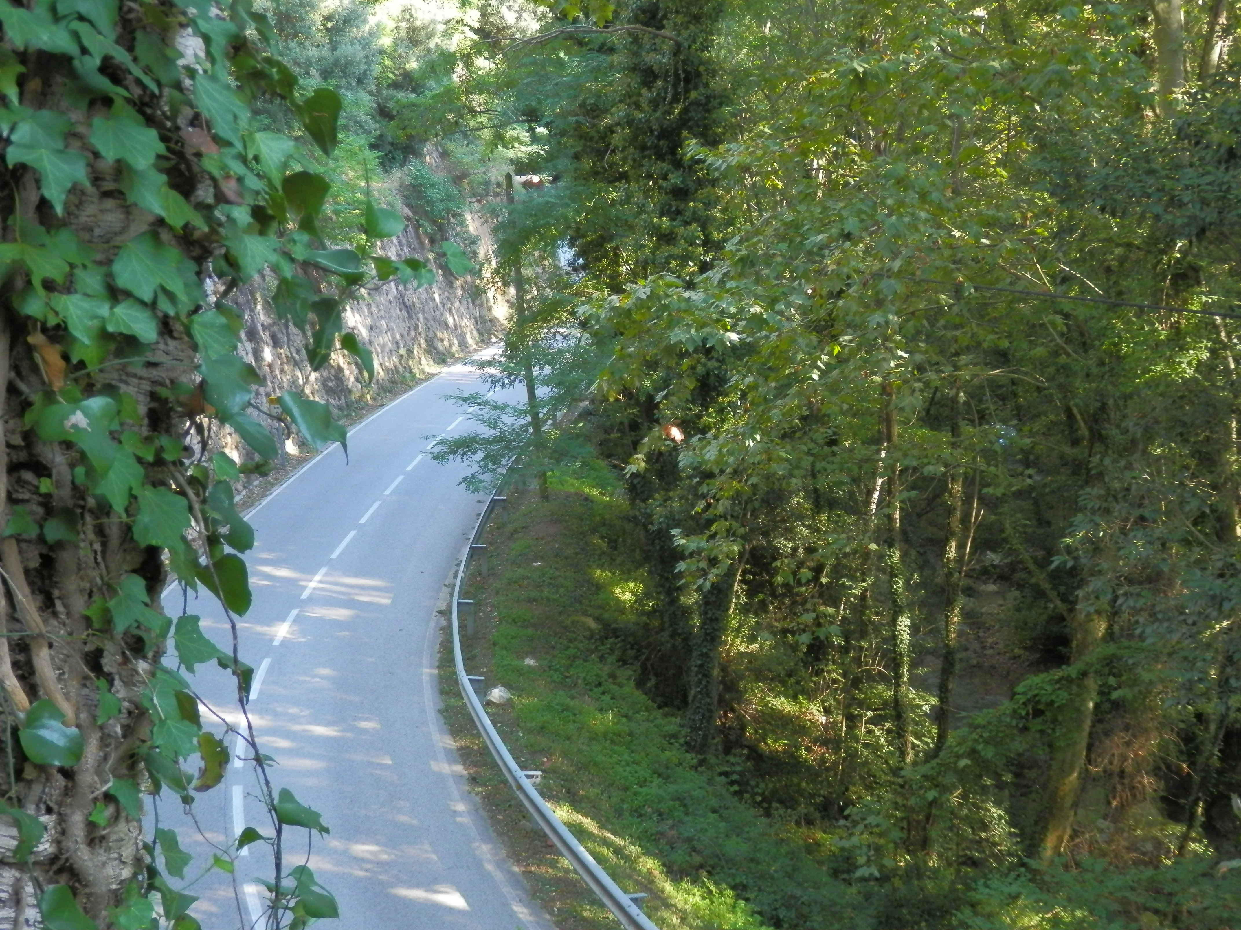 Estat actual del lloc del Combat d'Arbúcies de 1714.